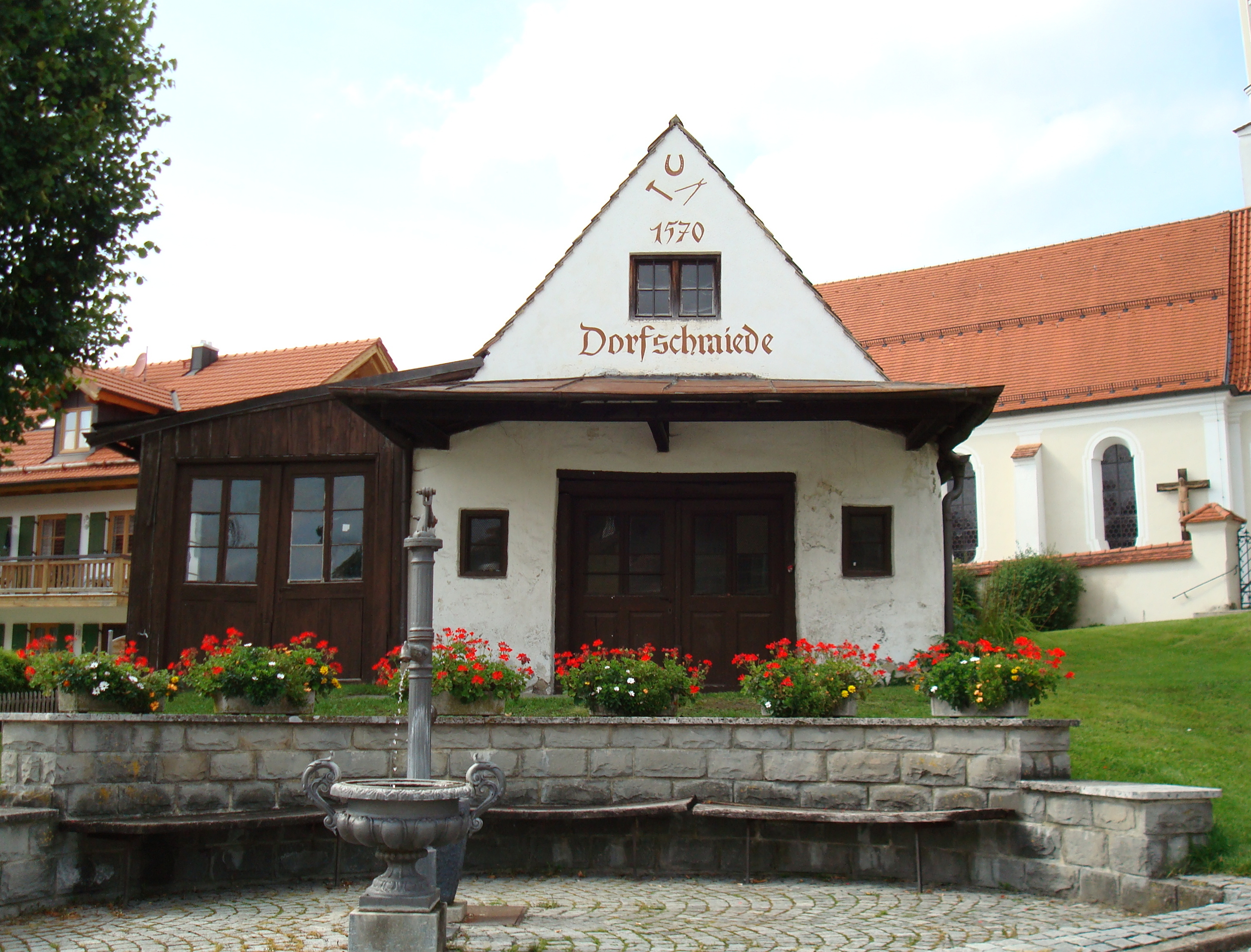 Andechs, Ortsteil Erling, Besengaßl, ehem. Dorfschmiede, erdgeschossiges Satteldachgebäude mit seitlichem Holzanbau aus der 1. Hälfte des 19. Jahrhunderts.